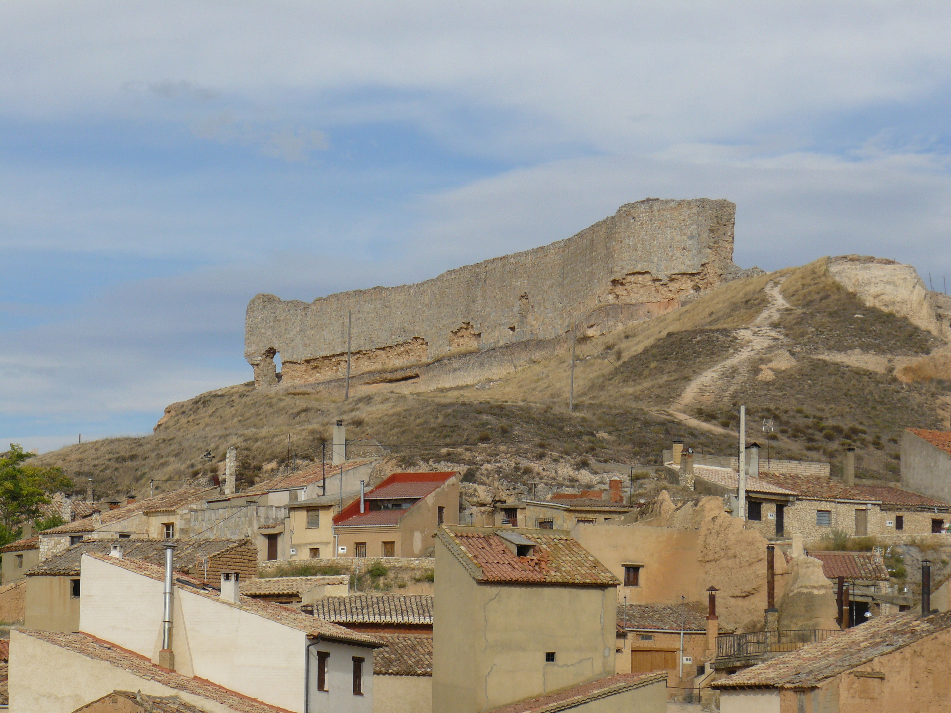 =Castillo de San Esteban de Gormaz, Soria.